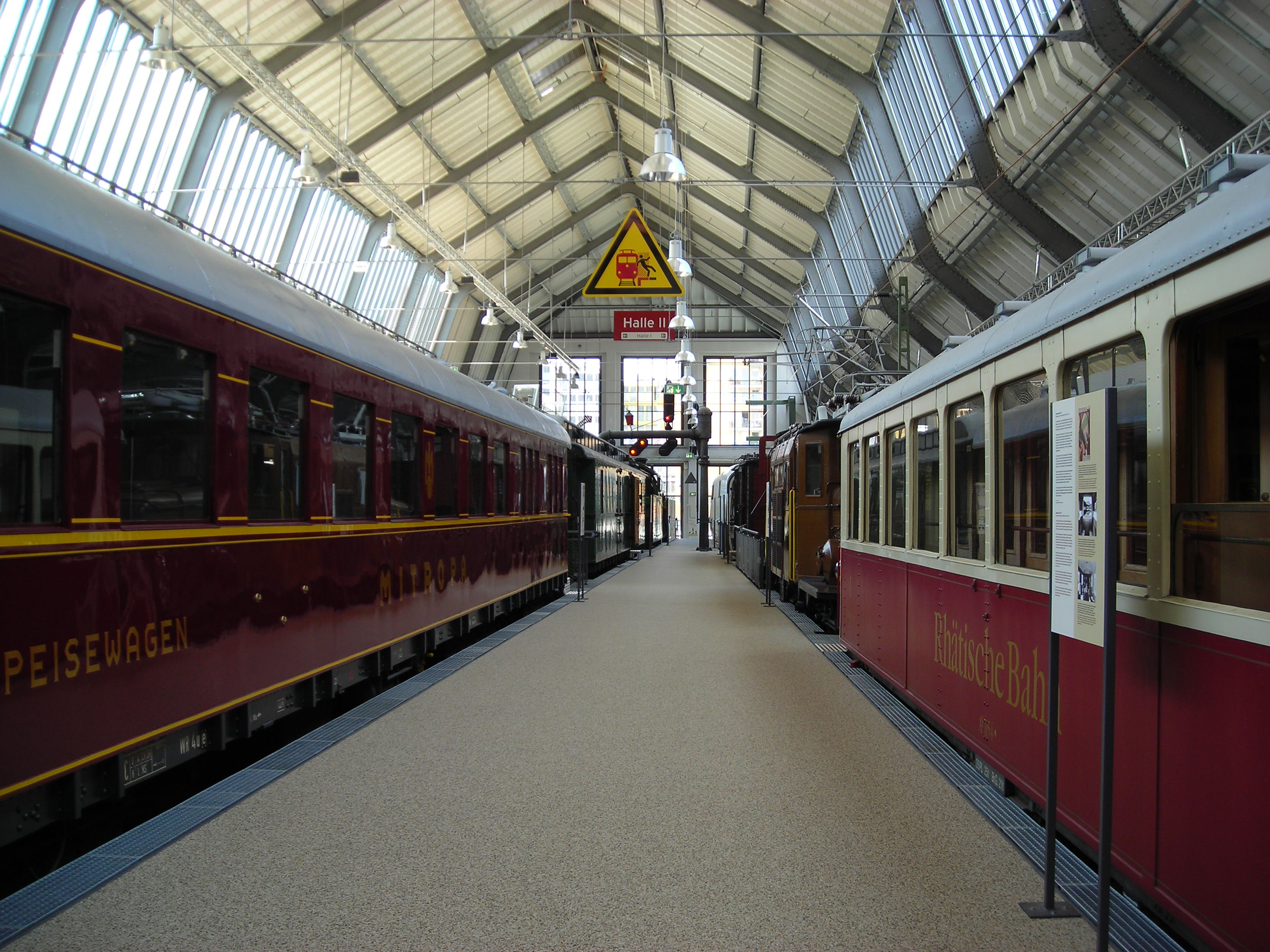 Deutsches Museum Verkehrszentrum, Halle II